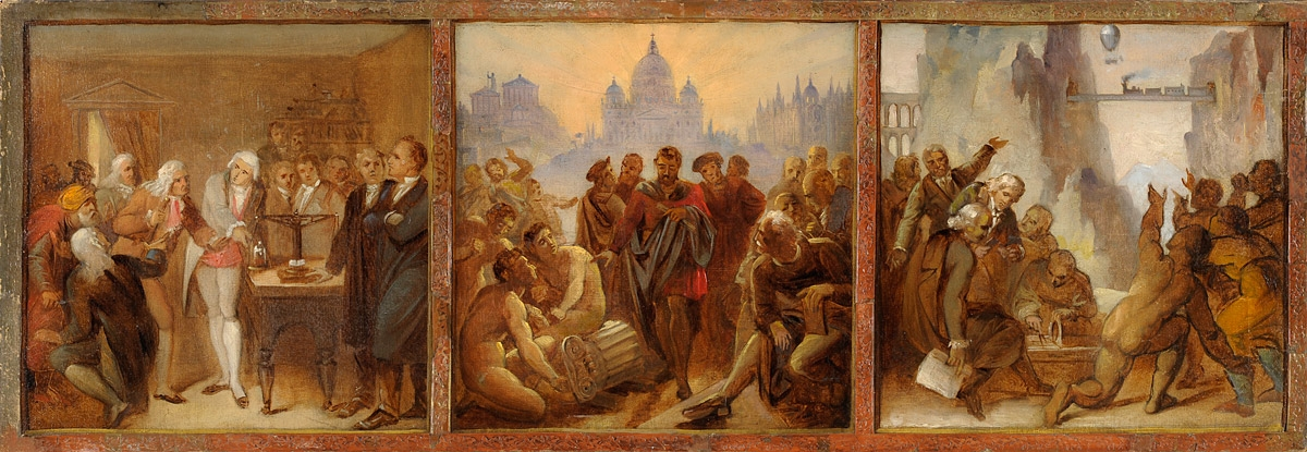 Triptychon. Öl auf Leinwand, 34 x 99 cm